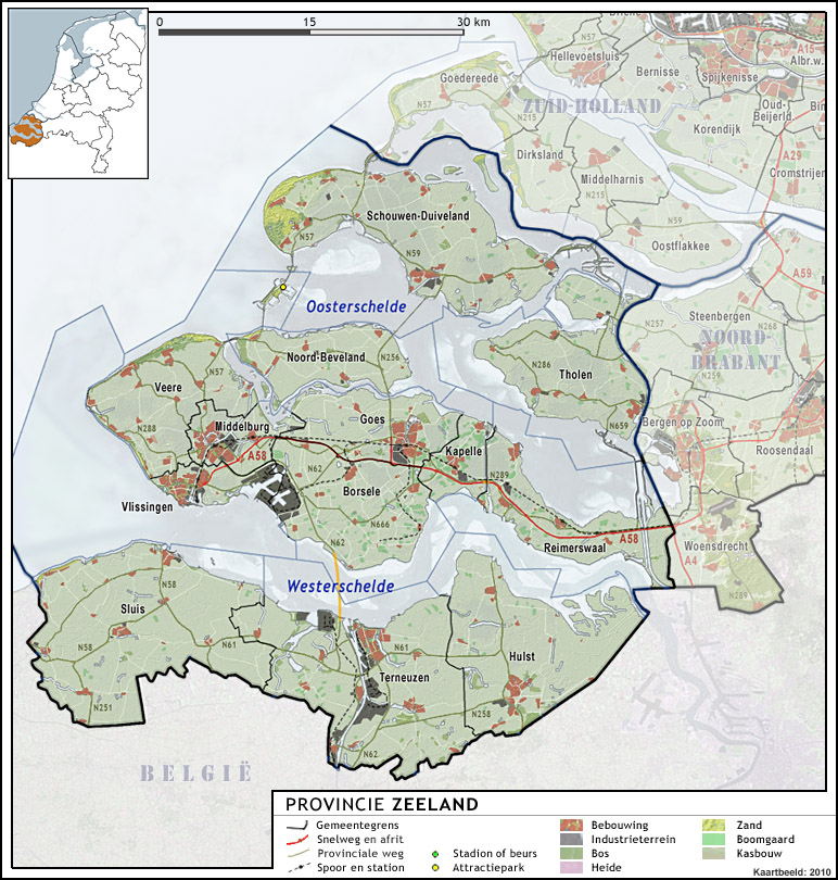 Provincie Zeeland, met indeling van gemeenten (2010) en impressie van het landschap. Door Jan-Willem van Aalst, samengesteld uit publiek beschikbare geo-data: Referentie-ondergrond (kustlijn, steden, wegen) gerasterd uit de OpenStreet Map OSM. ( Inhoud is beschikbaar onder de Creative Commons Attribution-ShareAlike 3.0 license. Referentie-ondergrond op water bewerkt vanuit Gebruik is vrij met bronvermelding NLR en ESA. Vectorgrenzen van gemeenten en regio's vrij ter beschikking gesteld met dank aan cartografen van brandweerregio's Hollands-Midden en IJsselland; gerasterd in Photoshop. Hoogte-aanduidingen (reliëf) gerasterd uit de AHN Viewer ( gebruik is vrij met bronvermelding (c) AHN, Overige kenmerken op de kaart: eigen tekenwerk van Jan-Willem van Aalst, op basis van gerasterde gemeentegrenzen.